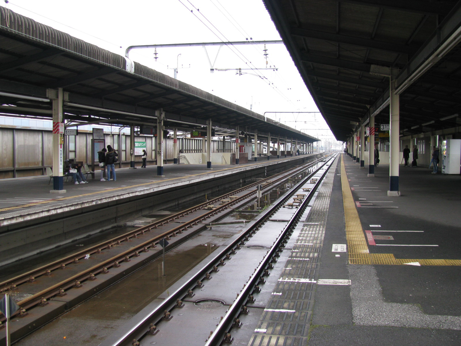 JR京葉線千葉みなと駅